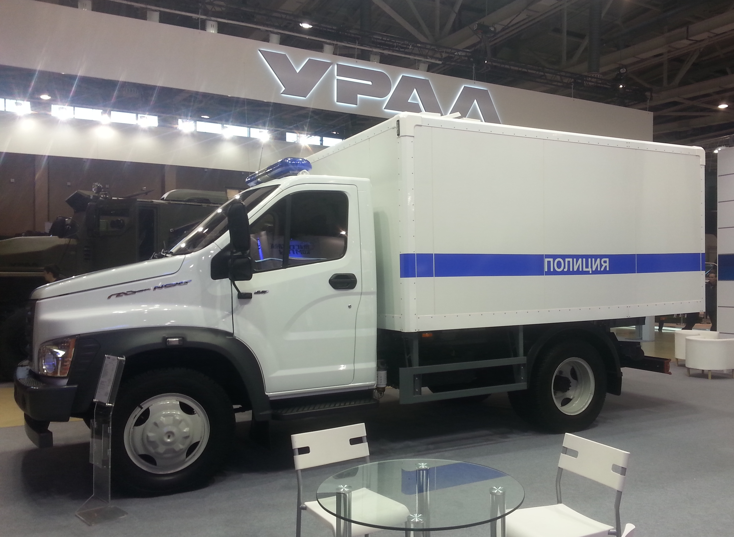 Автозак на шасси ГАЗон NEXT на выставке Интерполитех 2015